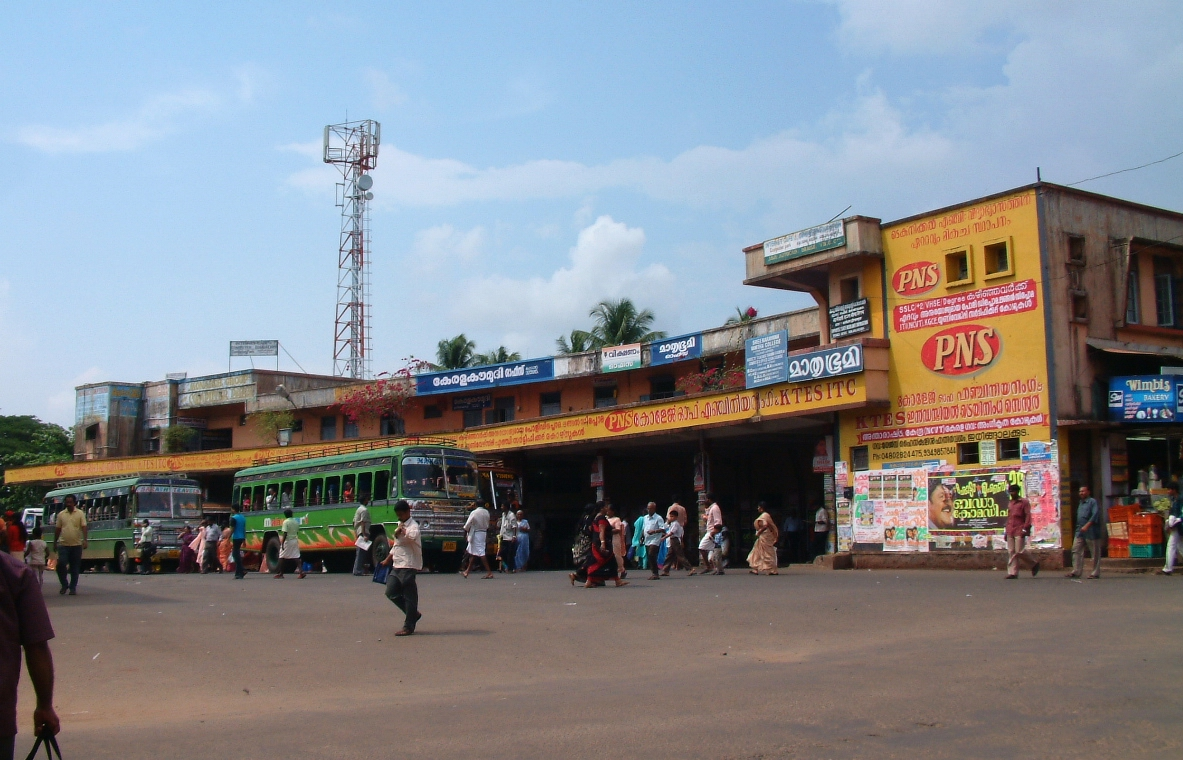 കാറിൽ ഇരുന്നെടുത്തതാണ്. ക്ഷമിക്കുക.